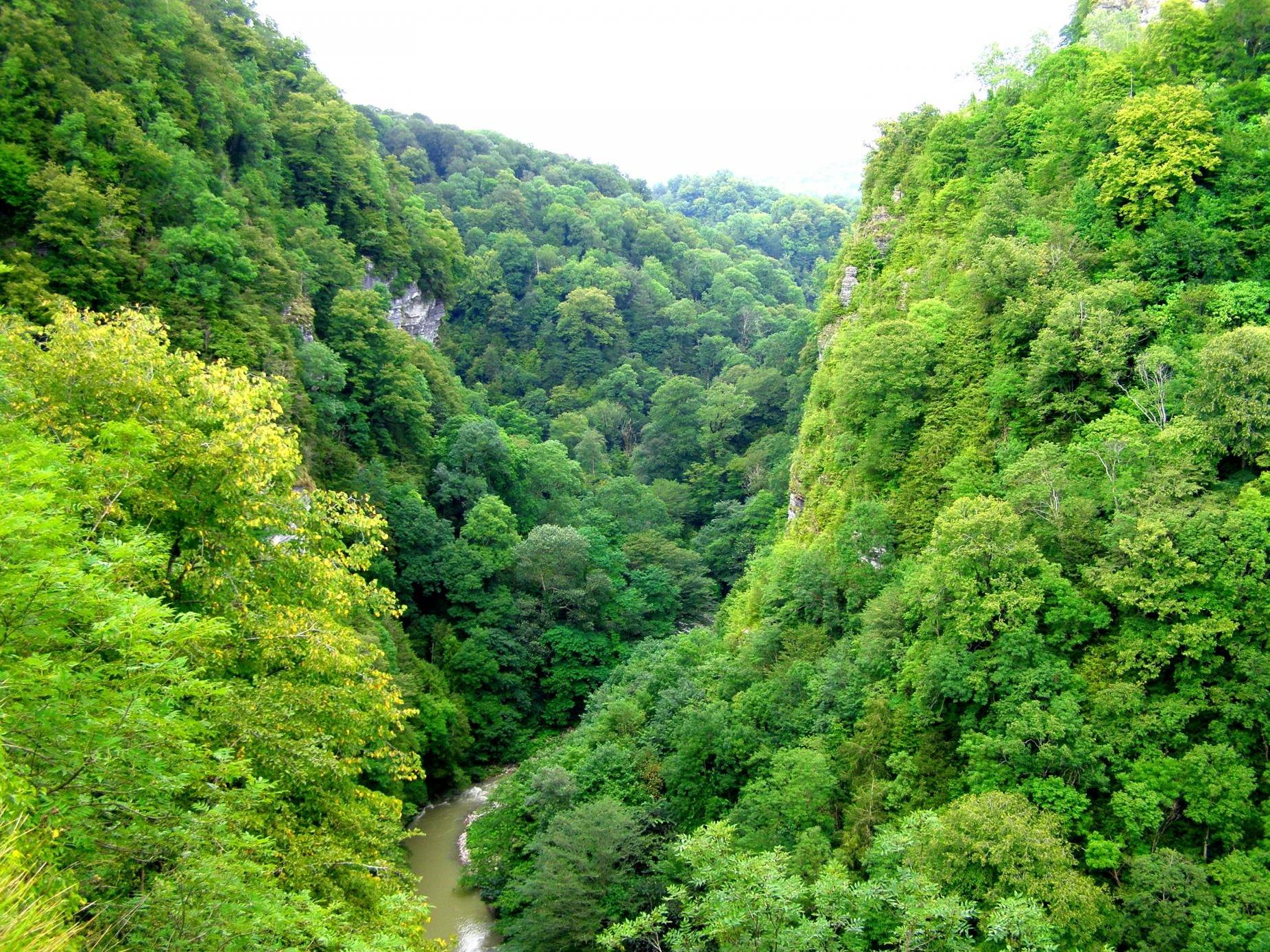 Тисо-самшитовая роща (300 га) (Краснодарский край, Сочи, 1 км от Хосты вверх по течению реки Хоста)